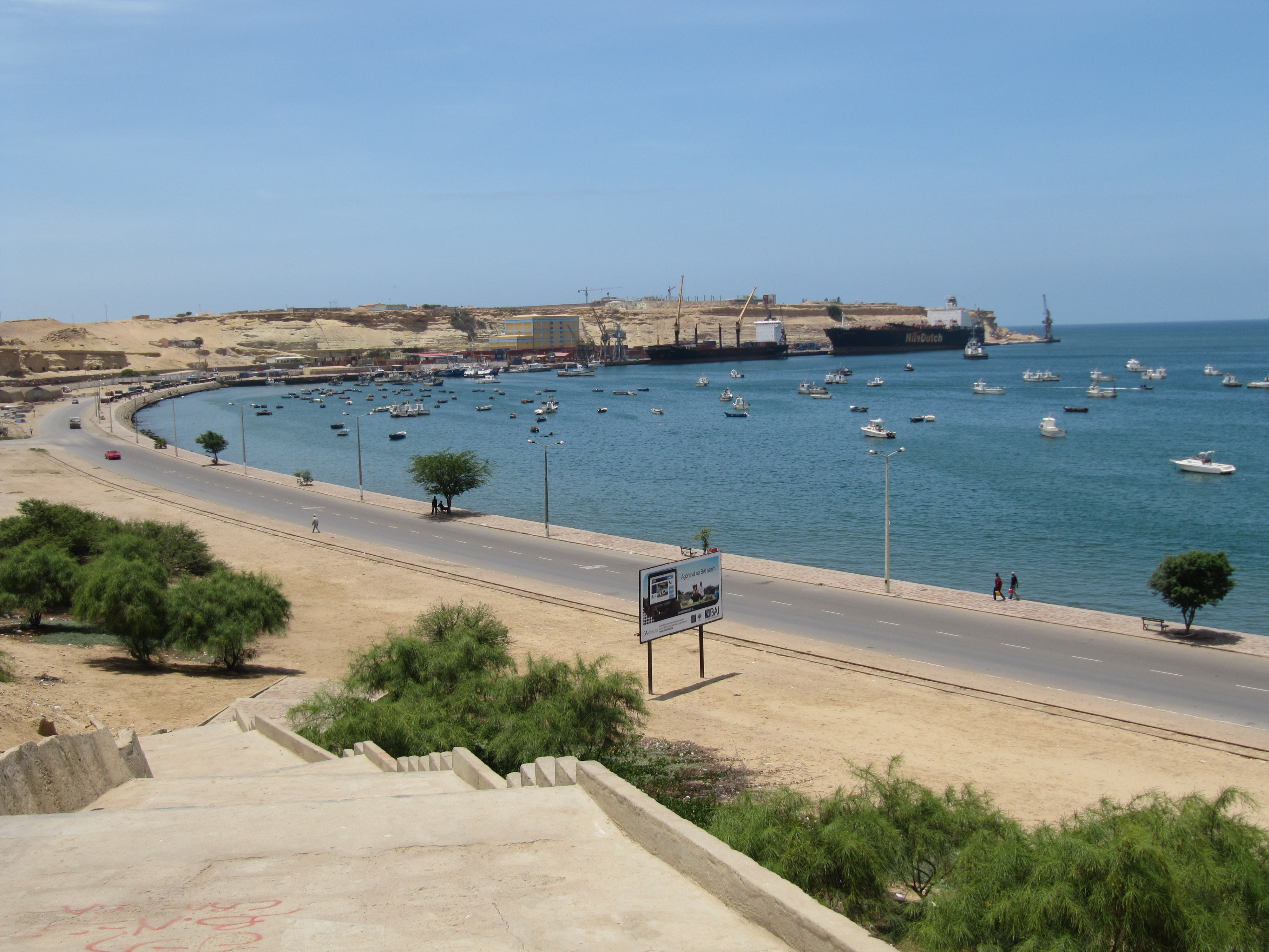 Marginal of Namibe, Angola